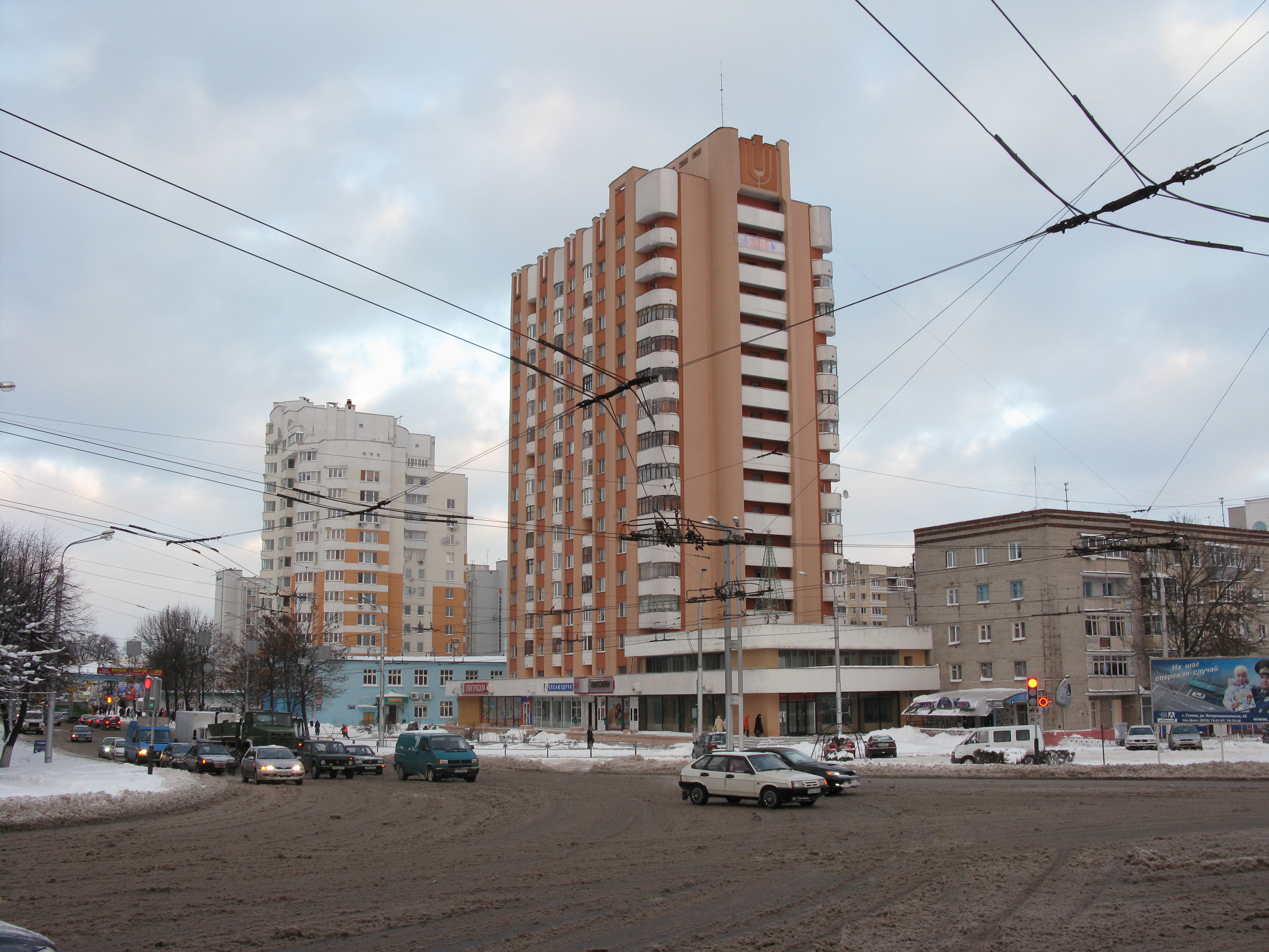 Das Ende der Straße Internatsionalnaya in der weißrussischen Stadt Gomel/Homel